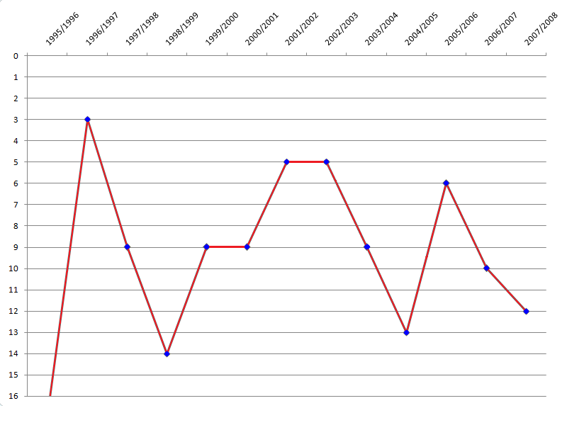 Odra Wodzisław w Ekstraklasie